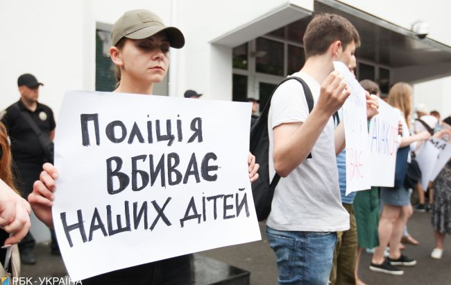 Вбивство Кирила Тлявова мітинг